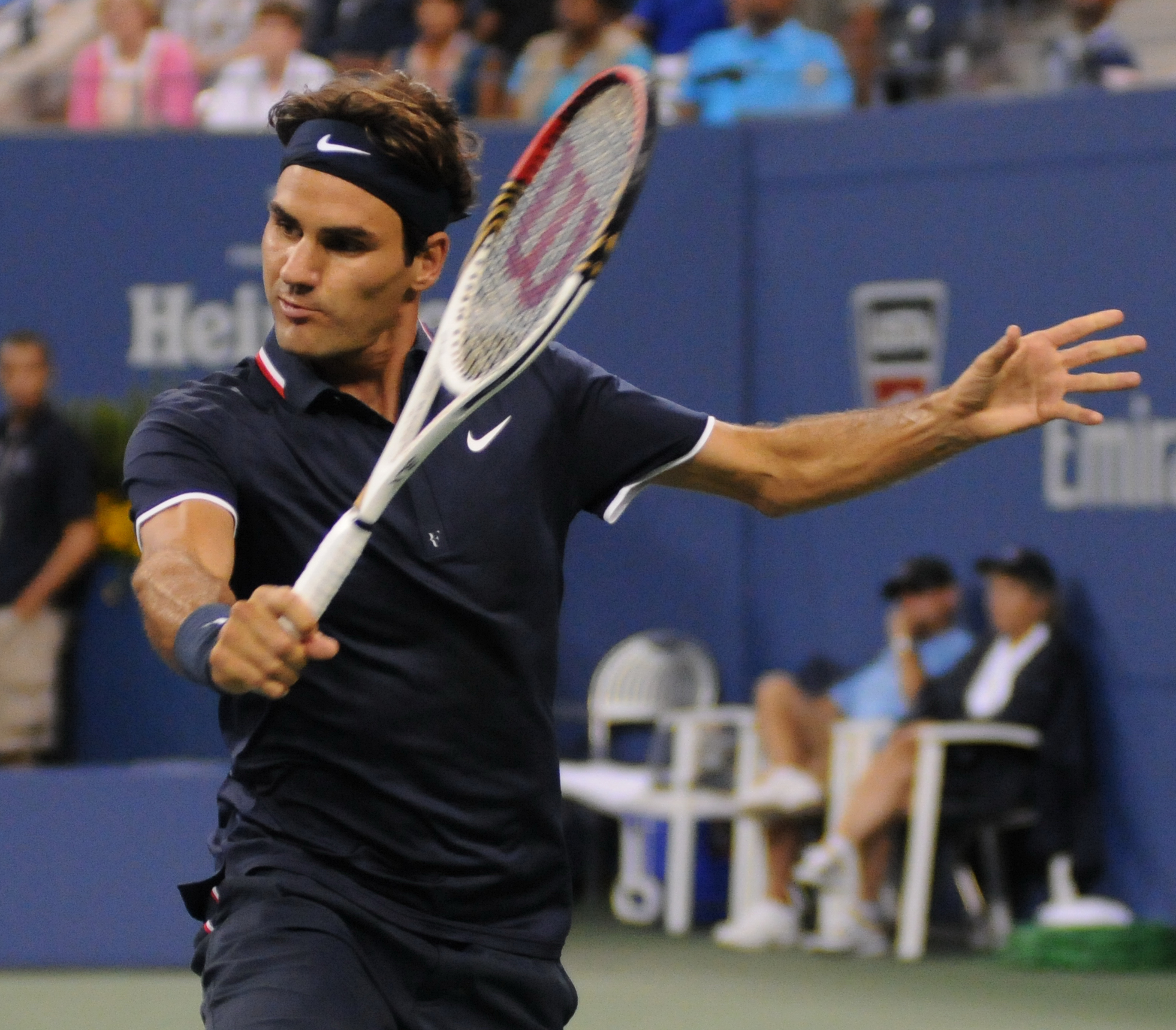 US Open 2012 US Open 2012